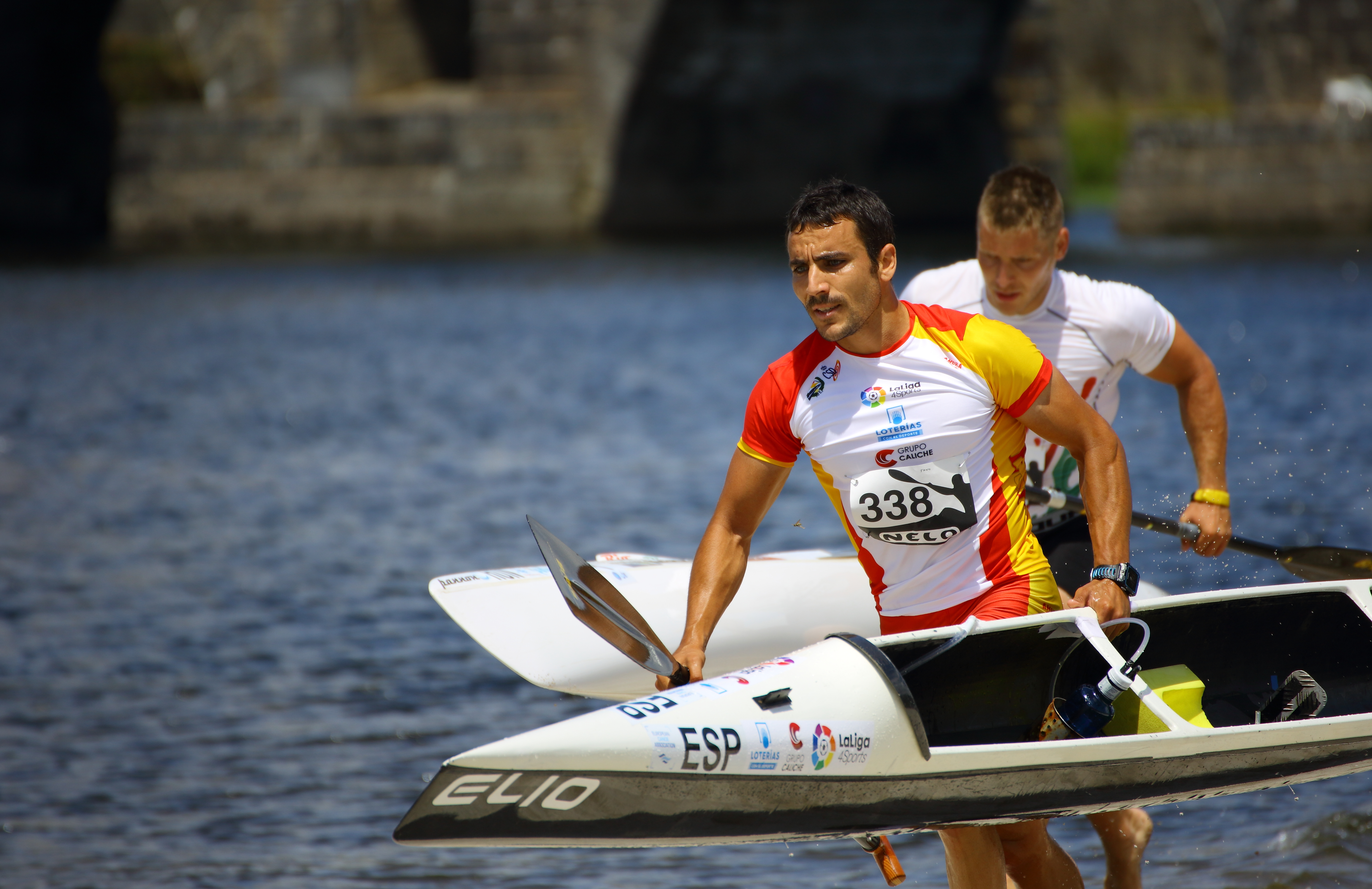 Ponte de Lima - CAMPOS Manuel (ESP) y KOVER Marton (HUN)